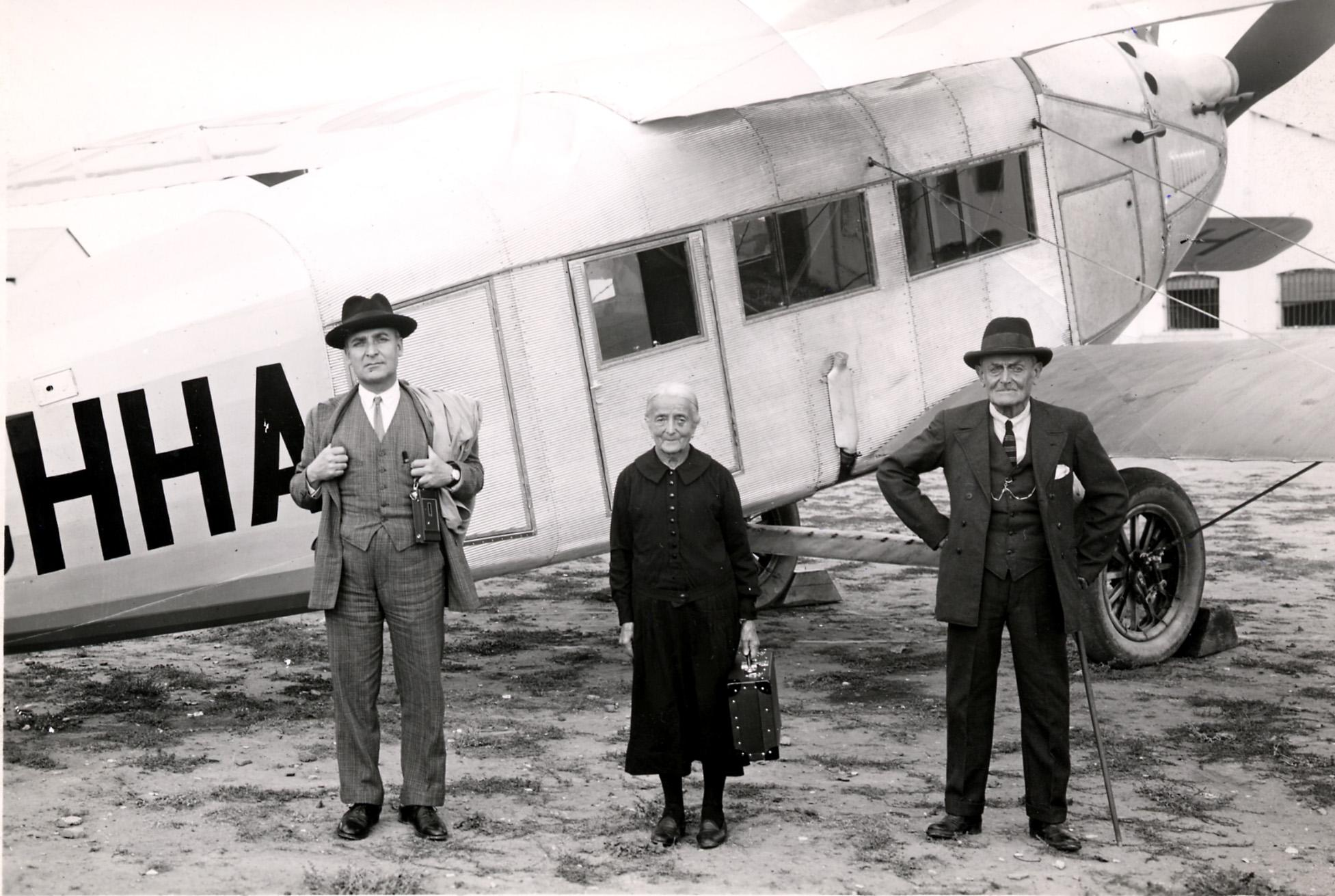 Primeiros passageiros da Iberia em frente a um avião Breguet 26T Limousine, em 1931 I primi passeggeri del Breguet 27 Limousine (1931) Passagiere vor der Breguet 27 Limousine - Maschine (1931)